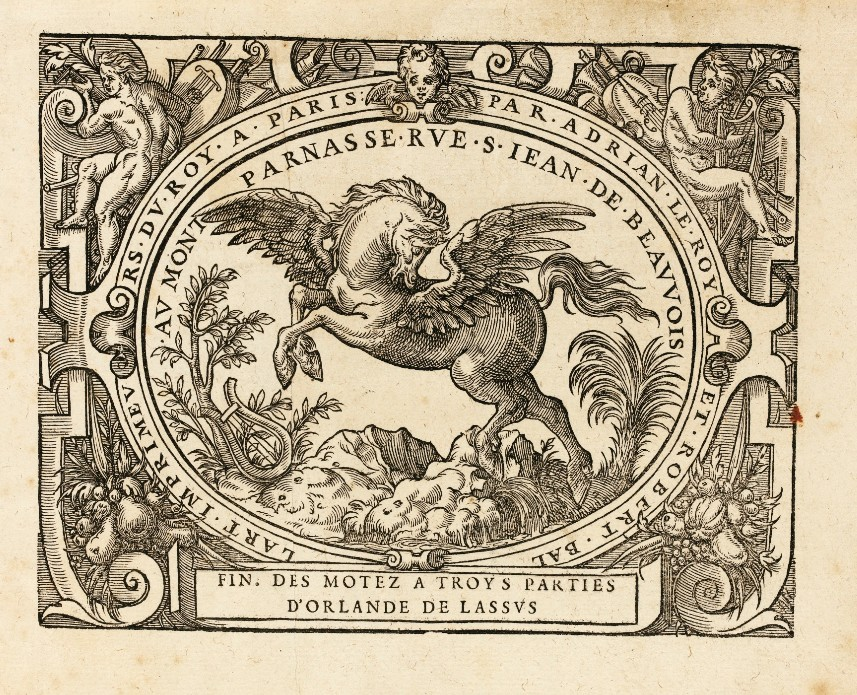 Typographical mark of Le Roy et Ballard, music printers (Paris)